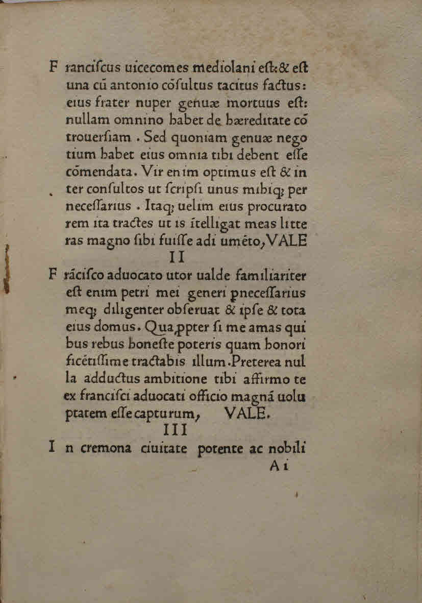 Epistole selectae (latino e italiano). - [Milano] : [Antonio Zarotto], [1480]. - 36, 40 c. ; A-C⁸,D-E⁶, a-e⁸ ; 4°. - Opera in due parti, testo latino e traduzione italiana. - Si tratta di una libera rielaborazione del curatore (con la sostituzione dei nomi antichi con altri moderni) di alcuni passaggi delle epistole di Cicerone. - Manca la c. E6. - La c. e8 è sostituita con una carta bianca .